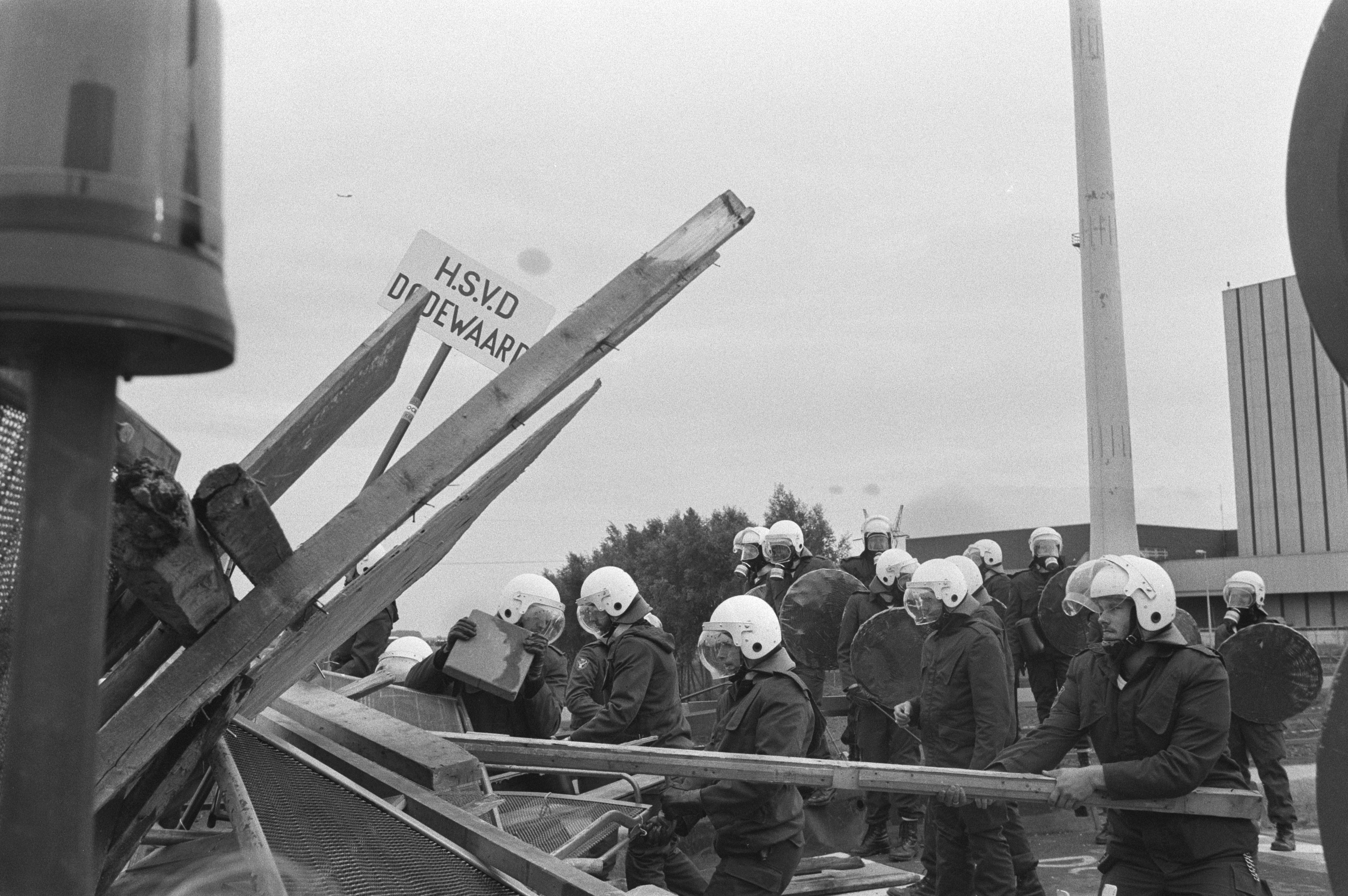 Blockade und Demonstration gegen das Kernkraftwerk Dodewaard. „Mobiele Eenheid“ vor dem Kraftwerk.